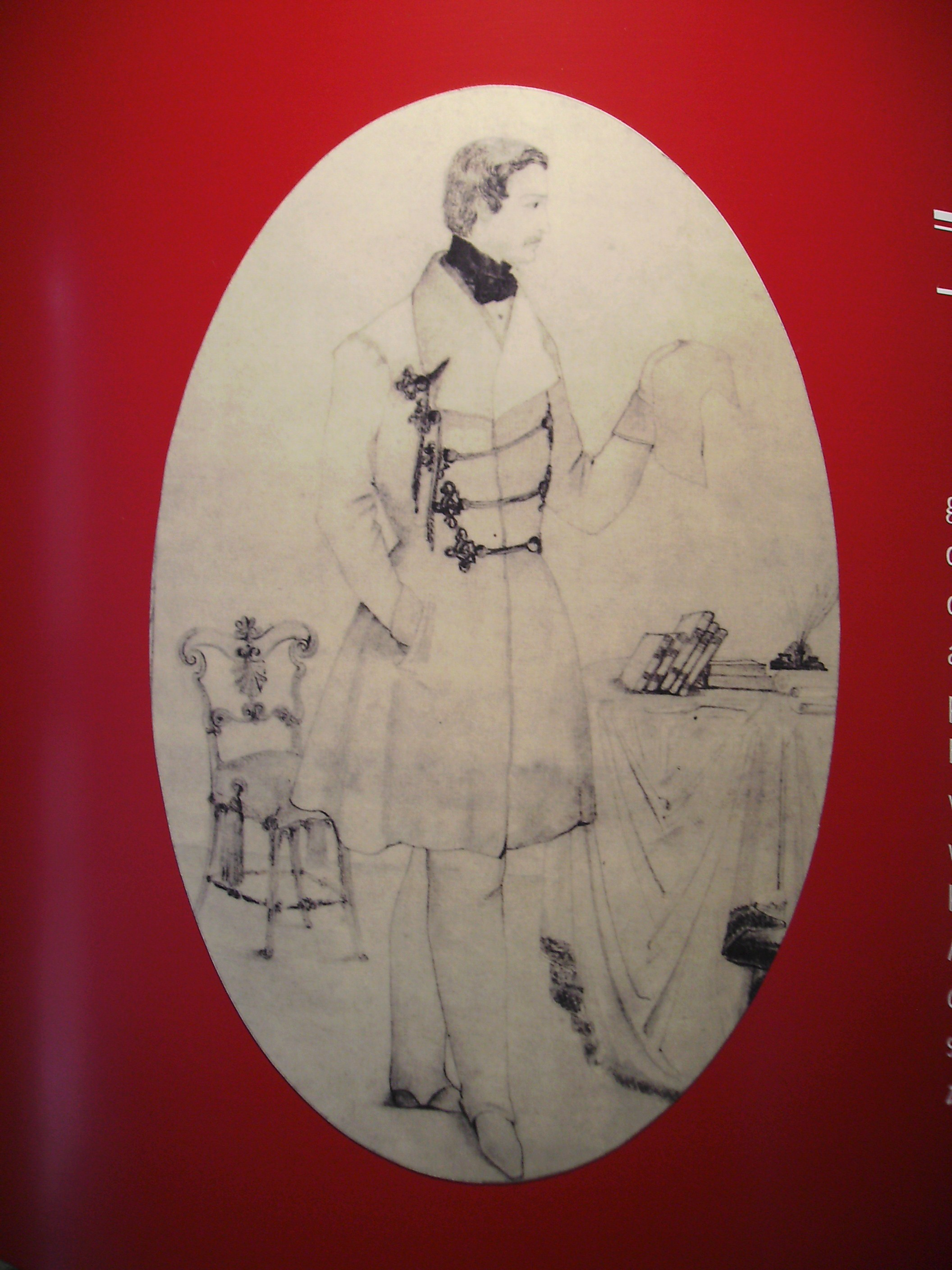 Daniel Friedrich Ludwig Pistor (Stich, um 1845)